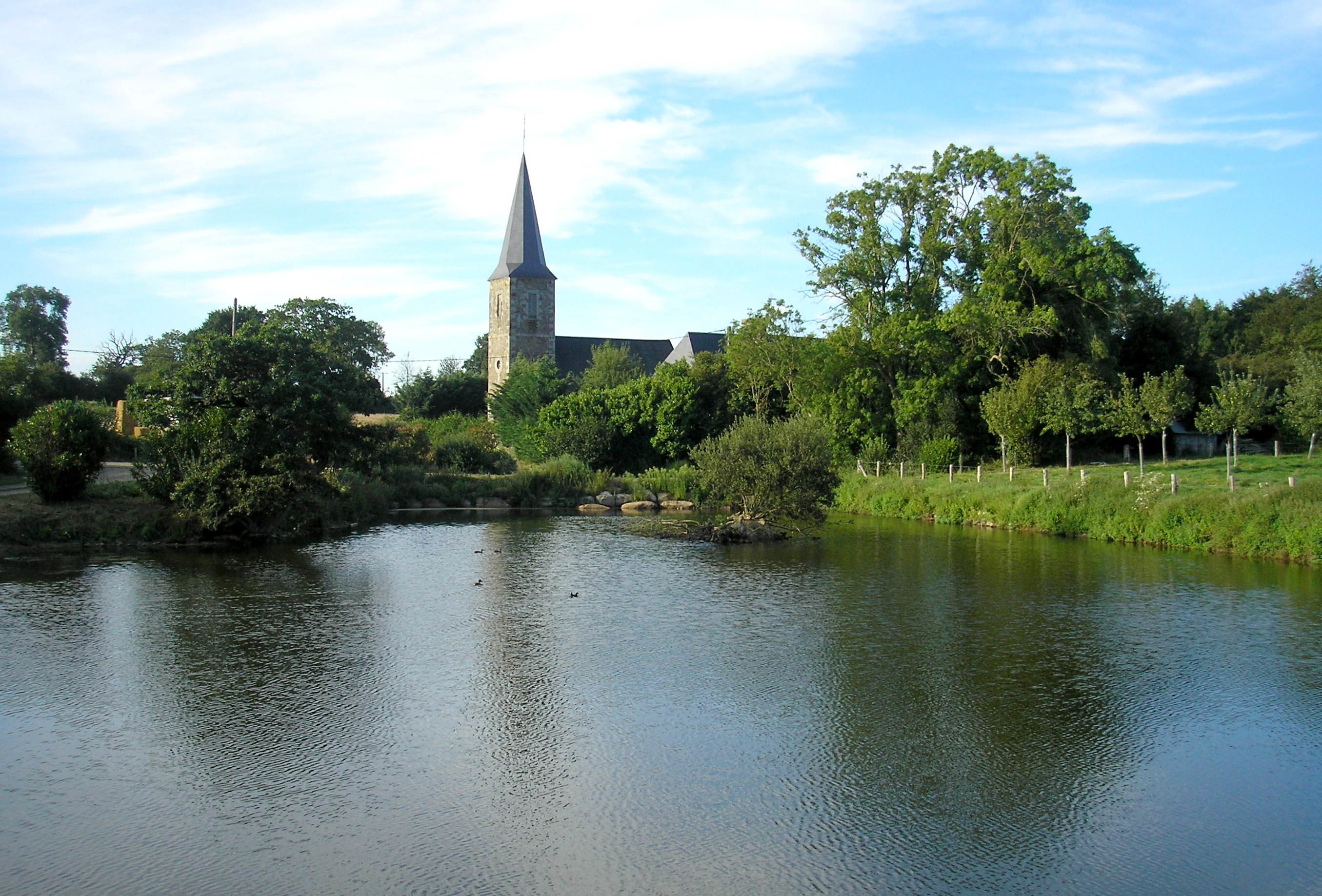 Le Désert (Normandie, France). L'église Notre-Dame.